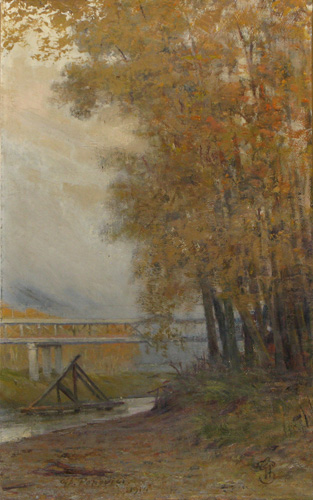 Gheorghe Popovici - Vedere de pe podul peste Moldova, ulei pe pânză, semnat, datat 1914 stânga jos, semnat în monogramă dreapta jos; lucrarea a figurat în Expoziţia "Gh. Popovici", organizată de Muzeul de artă din Iaşi - 1969-1970, cat.38. Pe verso intitulat, localizat, datat 1914 şi semnat; 36x21,5 cm.